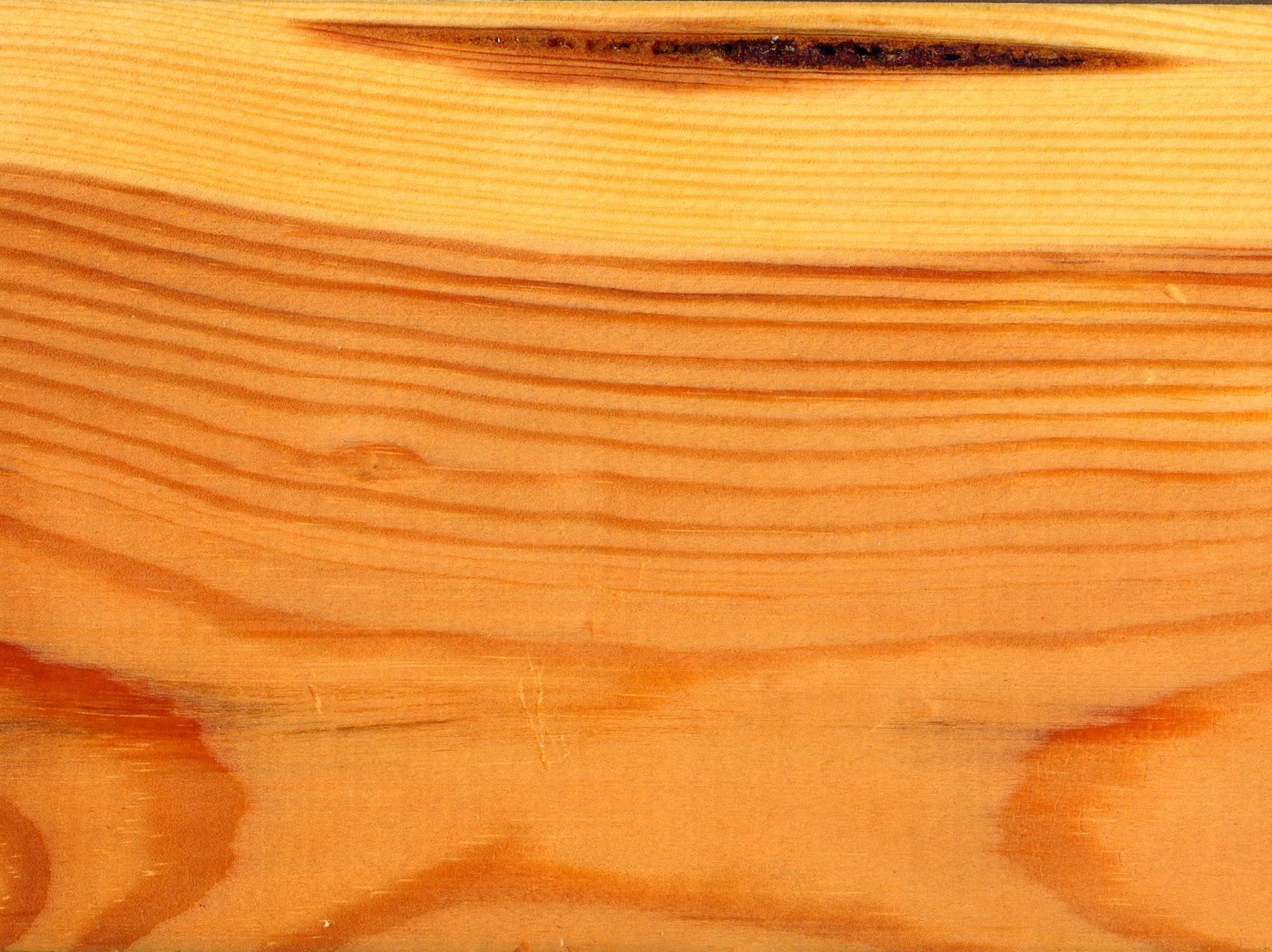 Pinus sylvestris, przekrój styczny i promieniowy przez drewno sosny pospolitej. Widoczny pęcherz żywiczny.